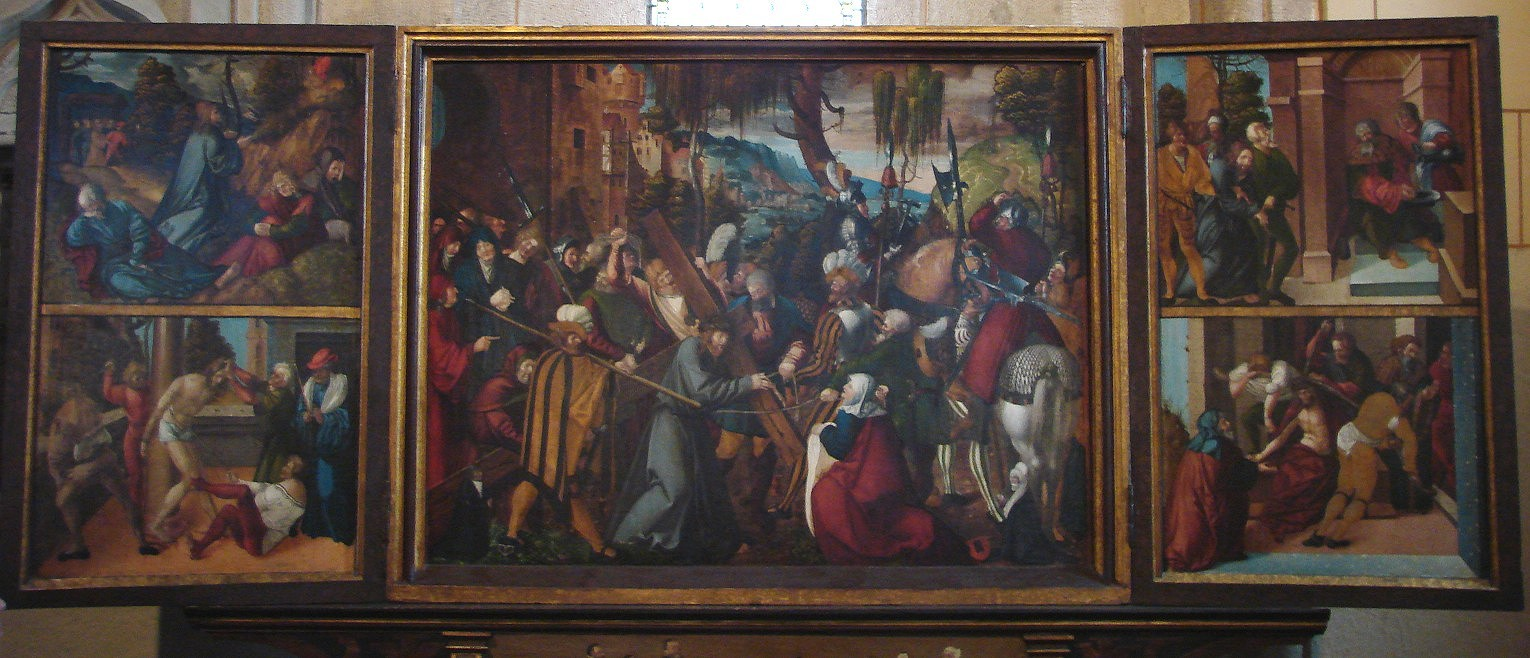 Stiftskirche Oberstenfeld, Renaissance Wing Altar